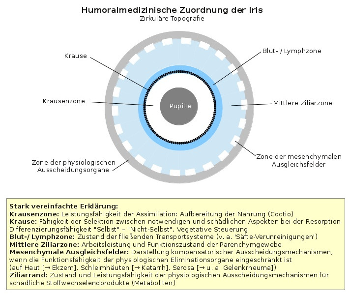 Eine in der Irisdiagnostik verwendete Einteilung der Iris in konzentrische Regionen gemäß der Traditionellen Europäischen Naturheilkunde TEN, Humoral- und Konstitutionsmedizin